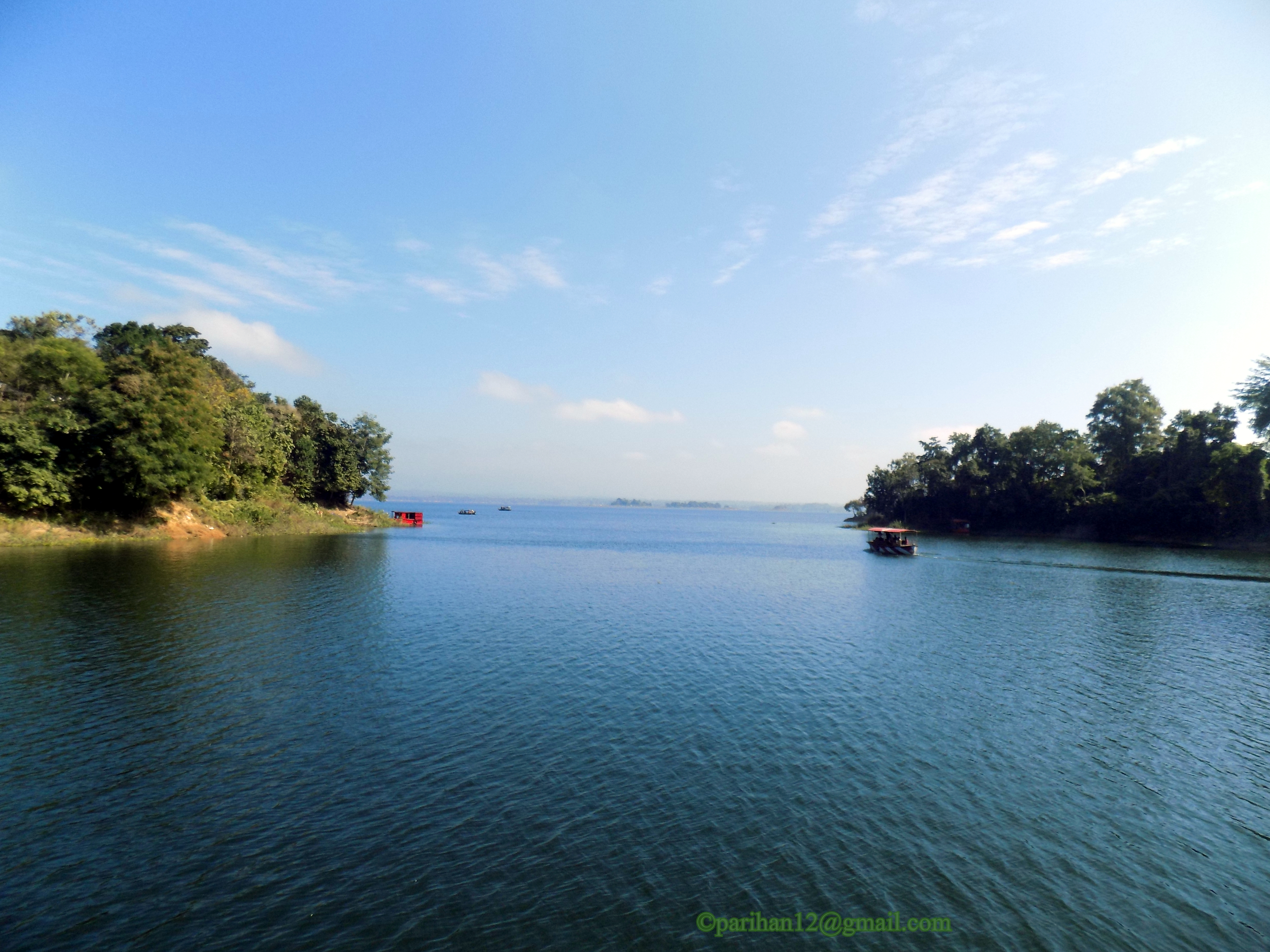 Aronnak Holiday Cottage, Rangamati